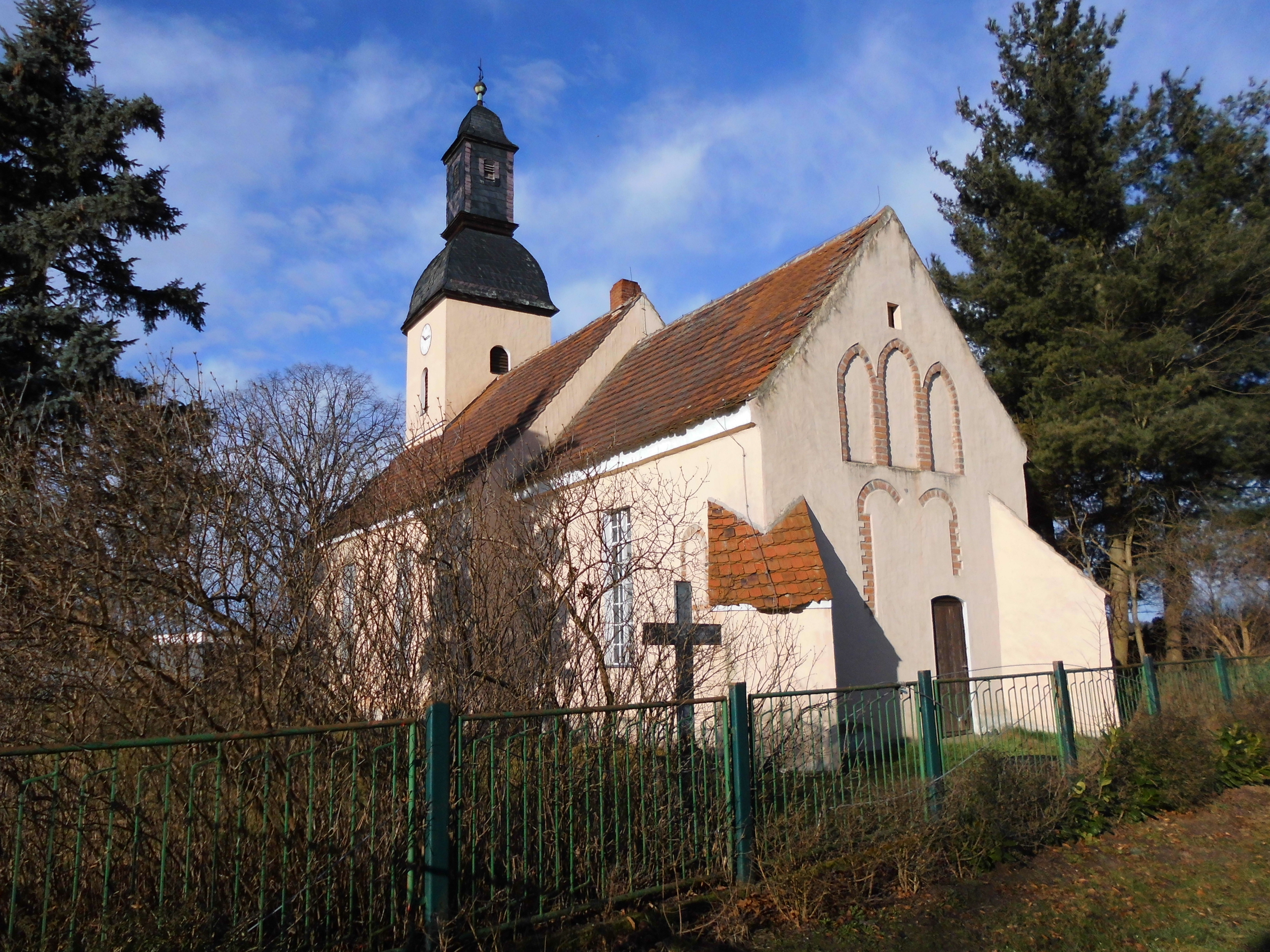 Dorfkirche Nitzahn, Ansicht von Südosten, Februar 2014